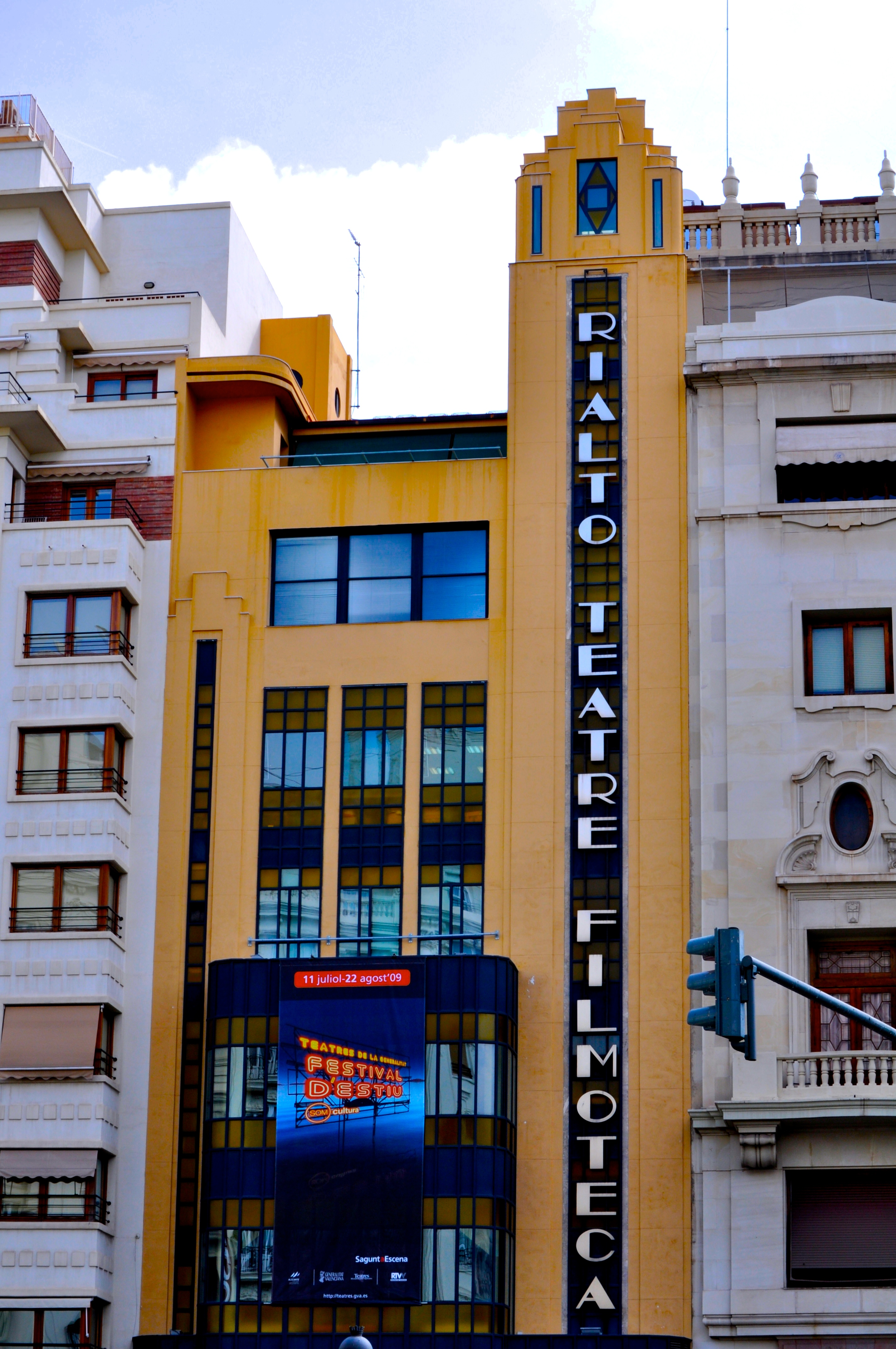 Teatro cine Rialto, Valencia, España.